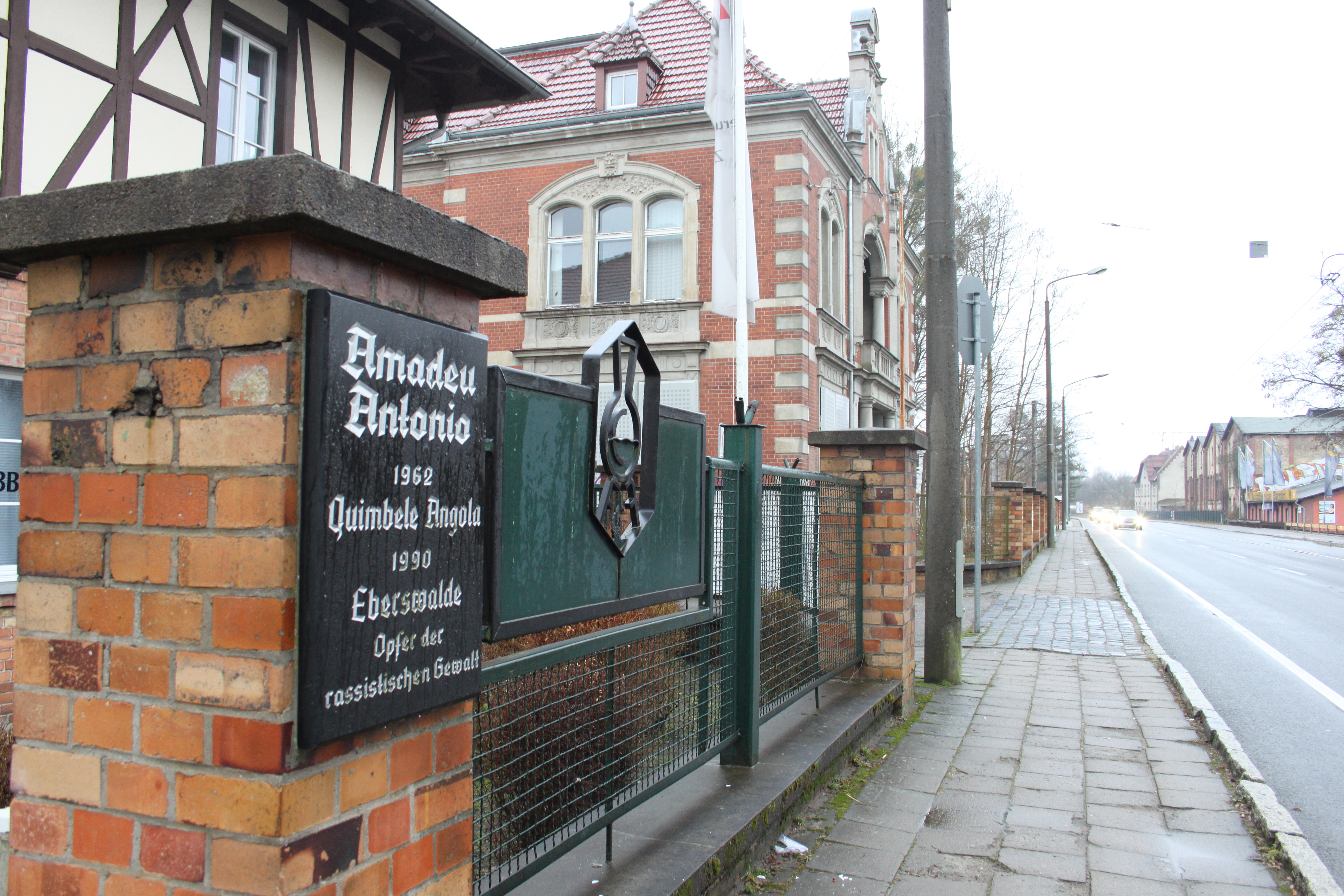 Gedenktafel, die in Eberswalde an die Ermordung von Amadeu Antonio erinnert. Die Gedenktafel befindet sich am Eingangspfeiler zum Grundstück der Eberswalderstr. 24a.